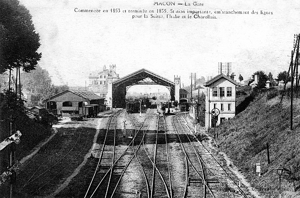 L'intérieur de la gare de Mâcon vers 1900.